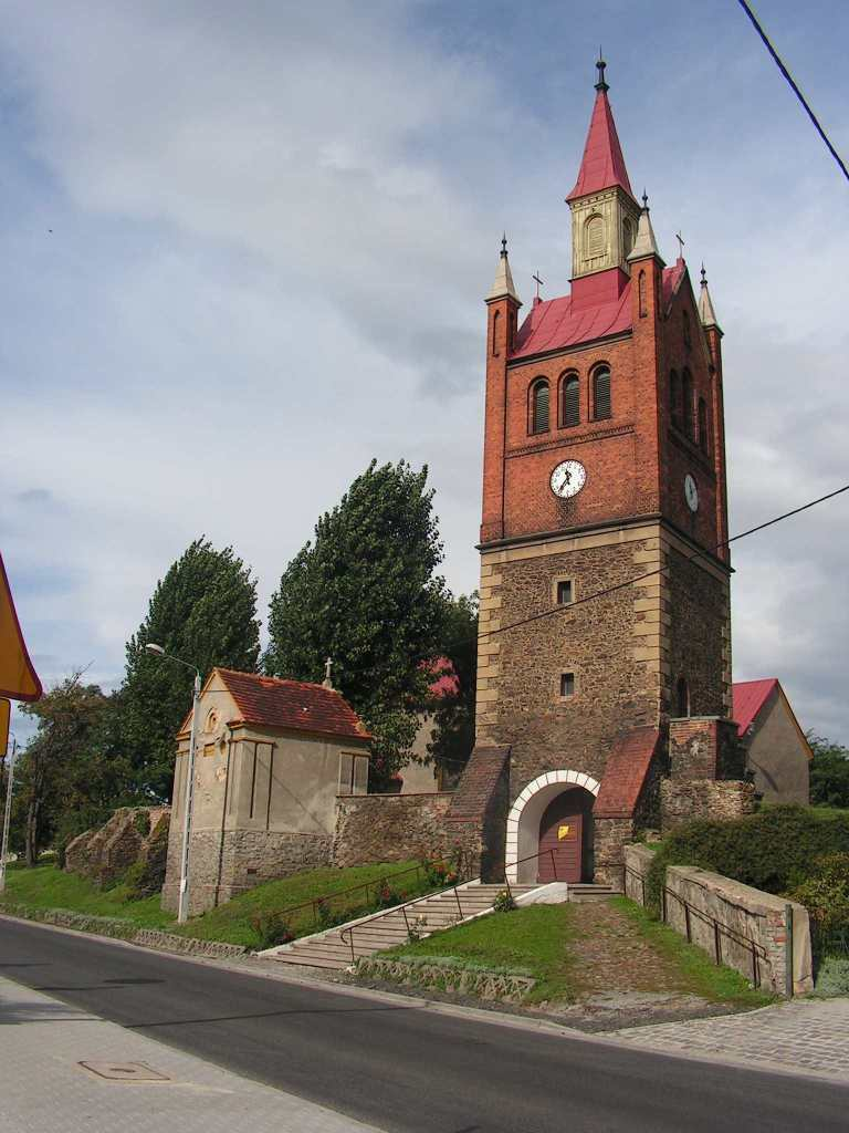 Kościół p.w. Matki Boskiej Częstochowskiej w Łagiewnikach (powiat dzierżoniowski), dzwonnica z bramą wejściową (zabytek nr rejestr. 4408/1357)